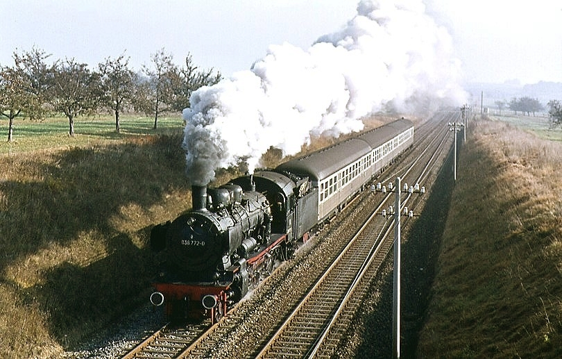 Dampflok 038 772 (ex 38 1772) am auf der Gäubahn bei Hochdorf.